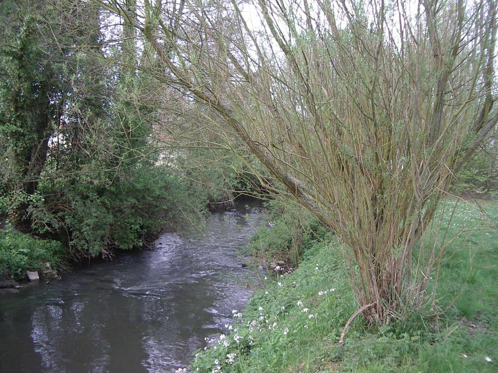 La Clarence à Lapugnoy (62)